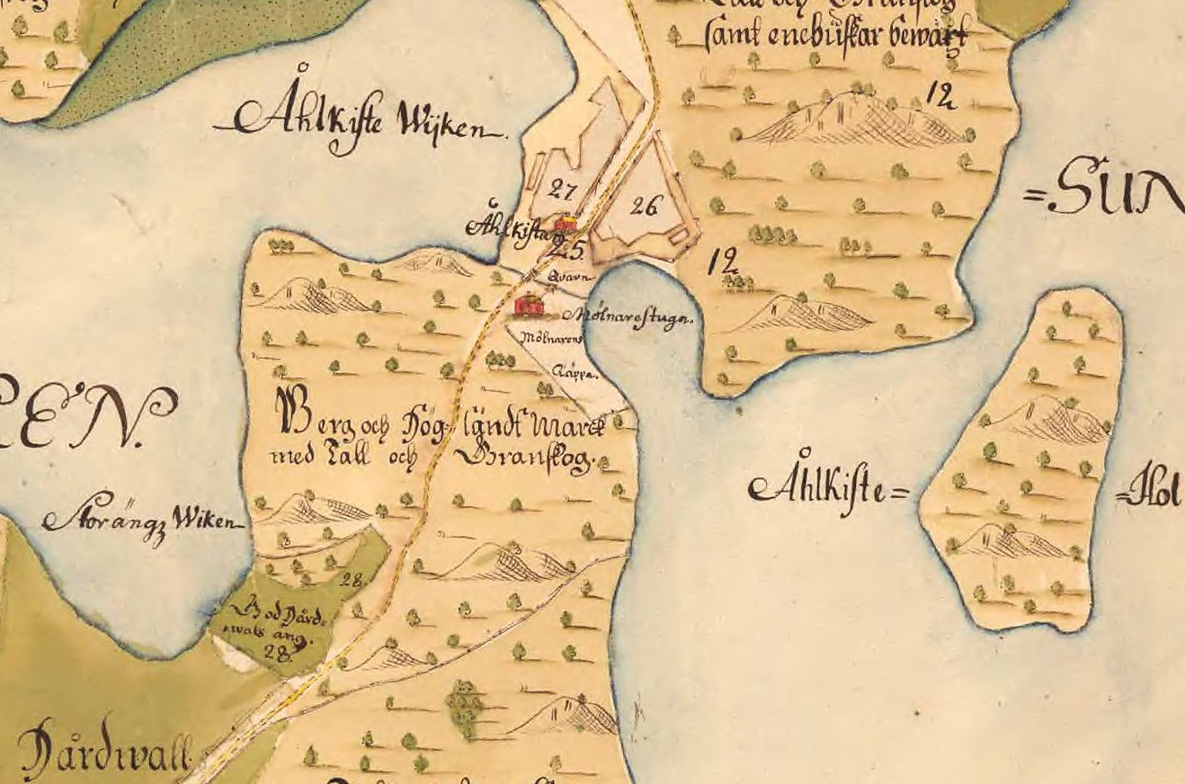 Området kring Ålkistan som hörde till Bergshamra gård